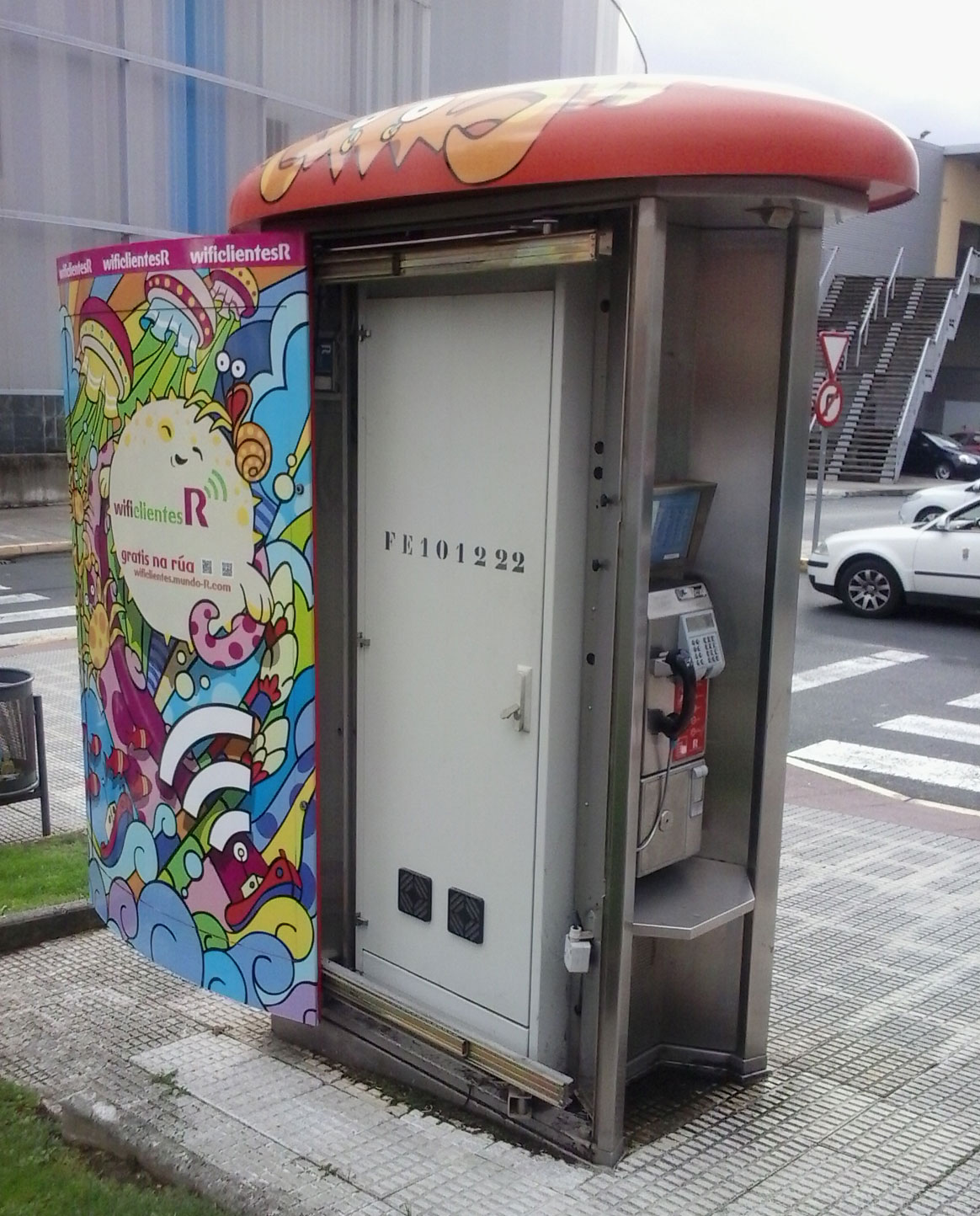 Cabina telefónica de R e nodo secundario na avda cataluña de Narón A Coruña Spain